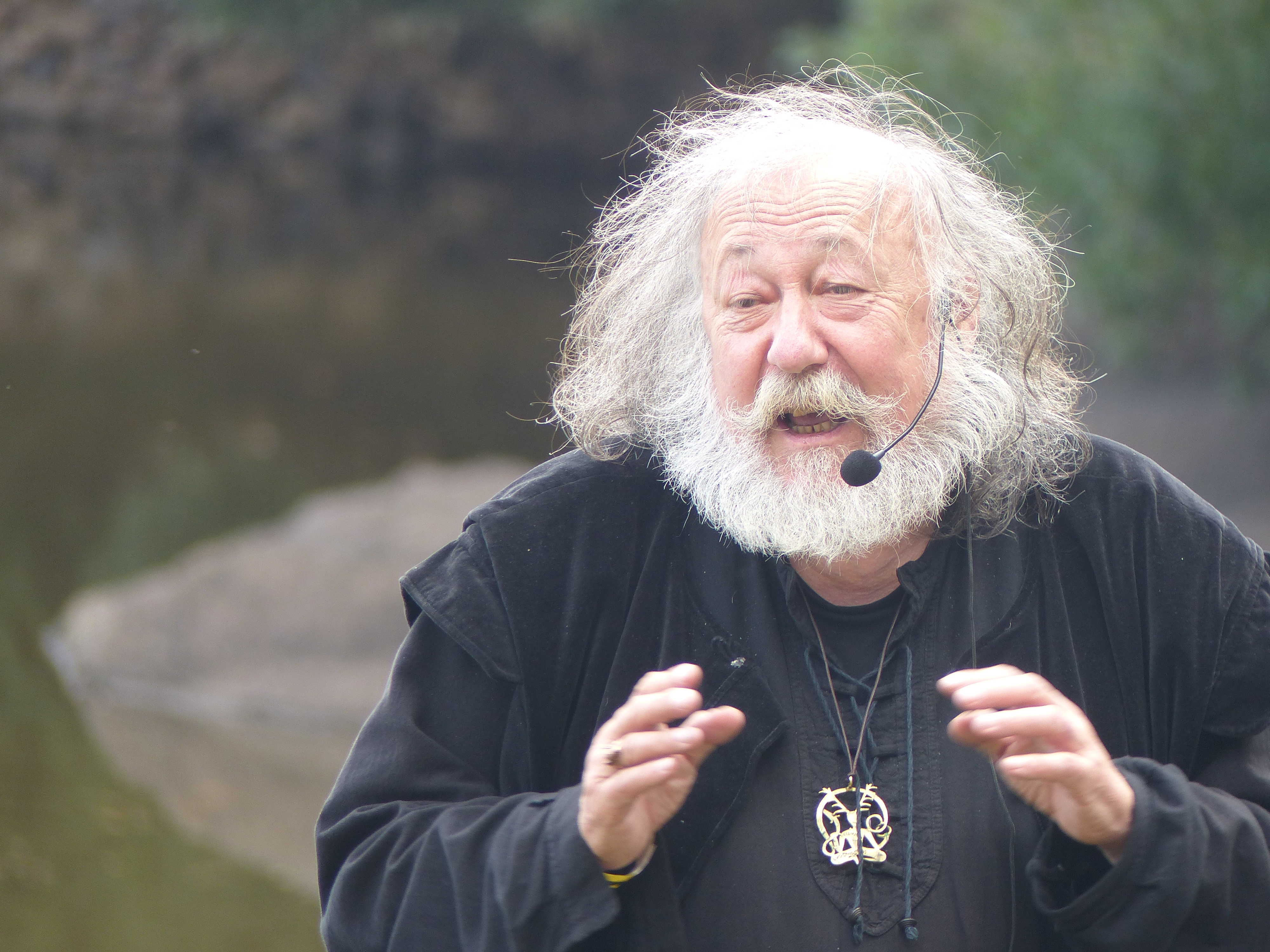 Le conteur français Pierre Dubois pendant un conte oral , "le mariage de Gauvain", au château de Comper le 5 août 2017.